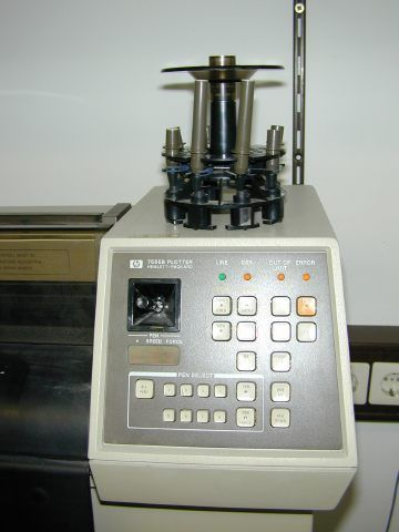 Bedienelemente HP A0 Plotter 7585B mit Stiftrad.